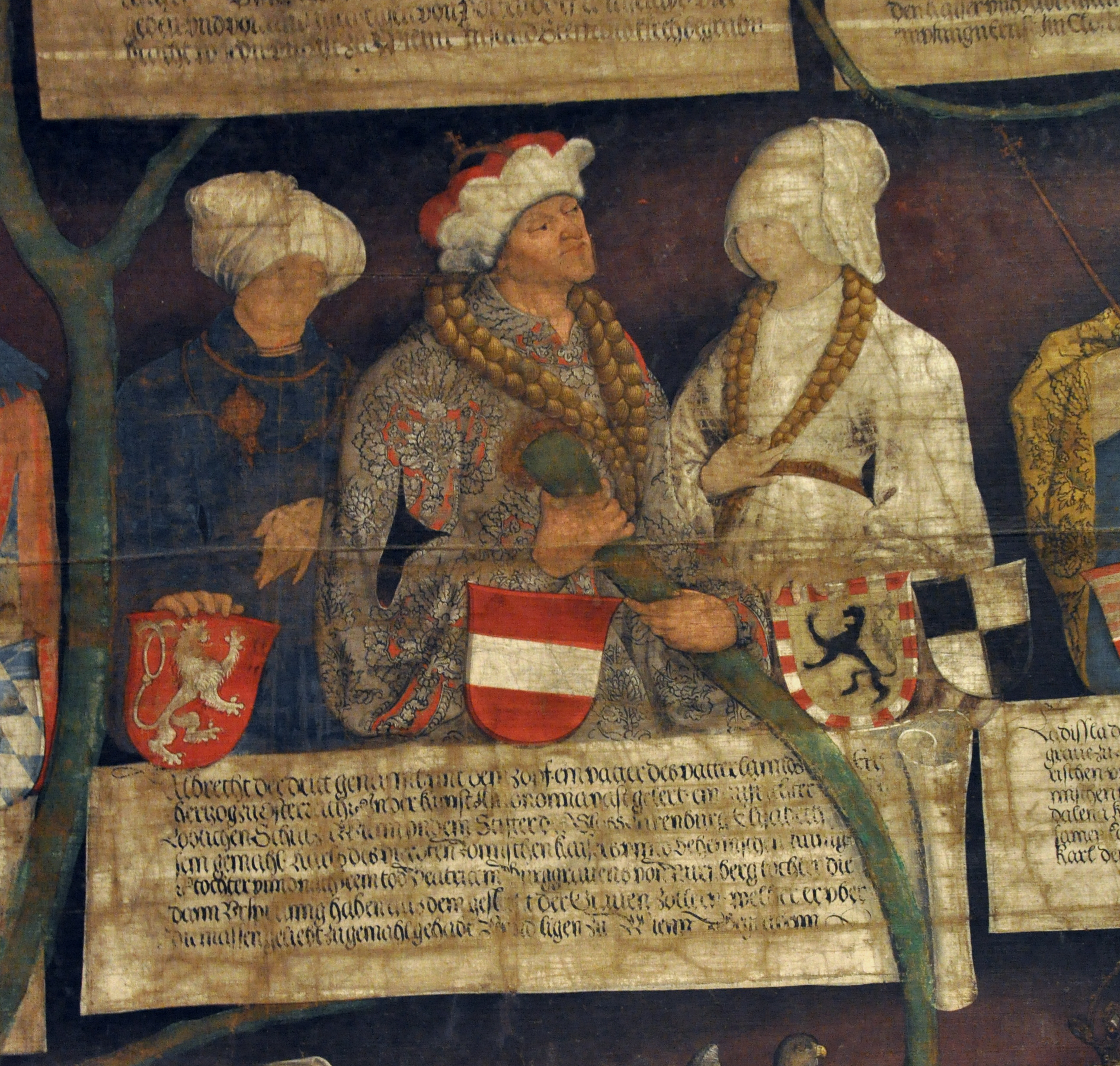 Hofjagd- und Rüstkammer (Neue Burg) Habsburgerstammbäume von Rudolf I. bis Philip I. dem Schönen; von Konrad Doll aus Freiburg (recte: Friedberg?), Tirol 1497; Detail: Albrecht III. "mit dem Zopf", links: 1. Ehefrau Elisabeth von Luxemburg-Böhmen, Tochter des Römisch-Deutschen Kaisers und Böhmischen Königs Karl IV; rechts 2. Ehefrau Beatrix von Zollern, Tochter von Friedrich V. Burggraf von Nürnberg